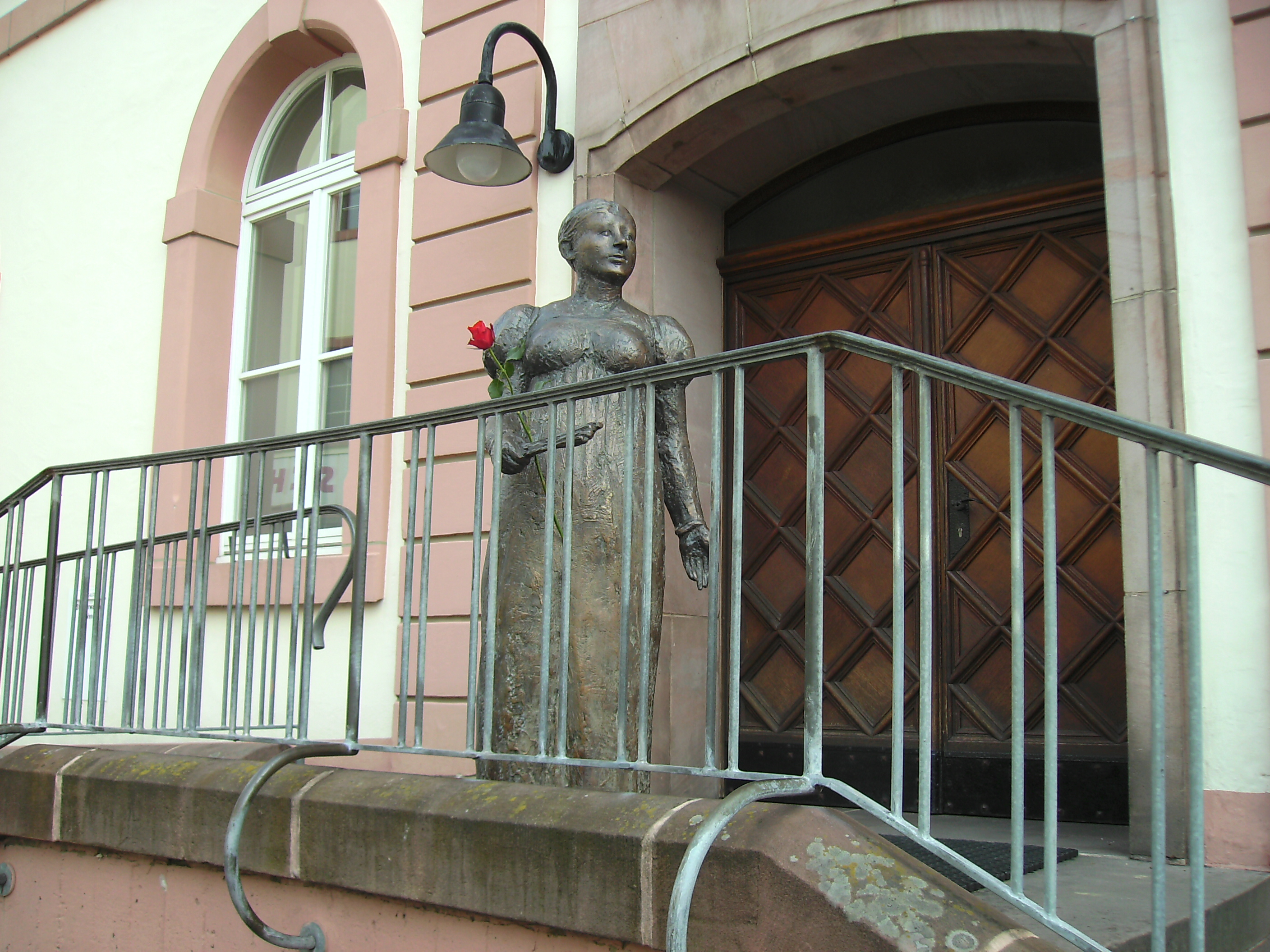 Bronzeplastik der Herzogin Luise von Sachsen-Coburg-Saalfeld. Standort: Treppe des St. Wendler Rathauses